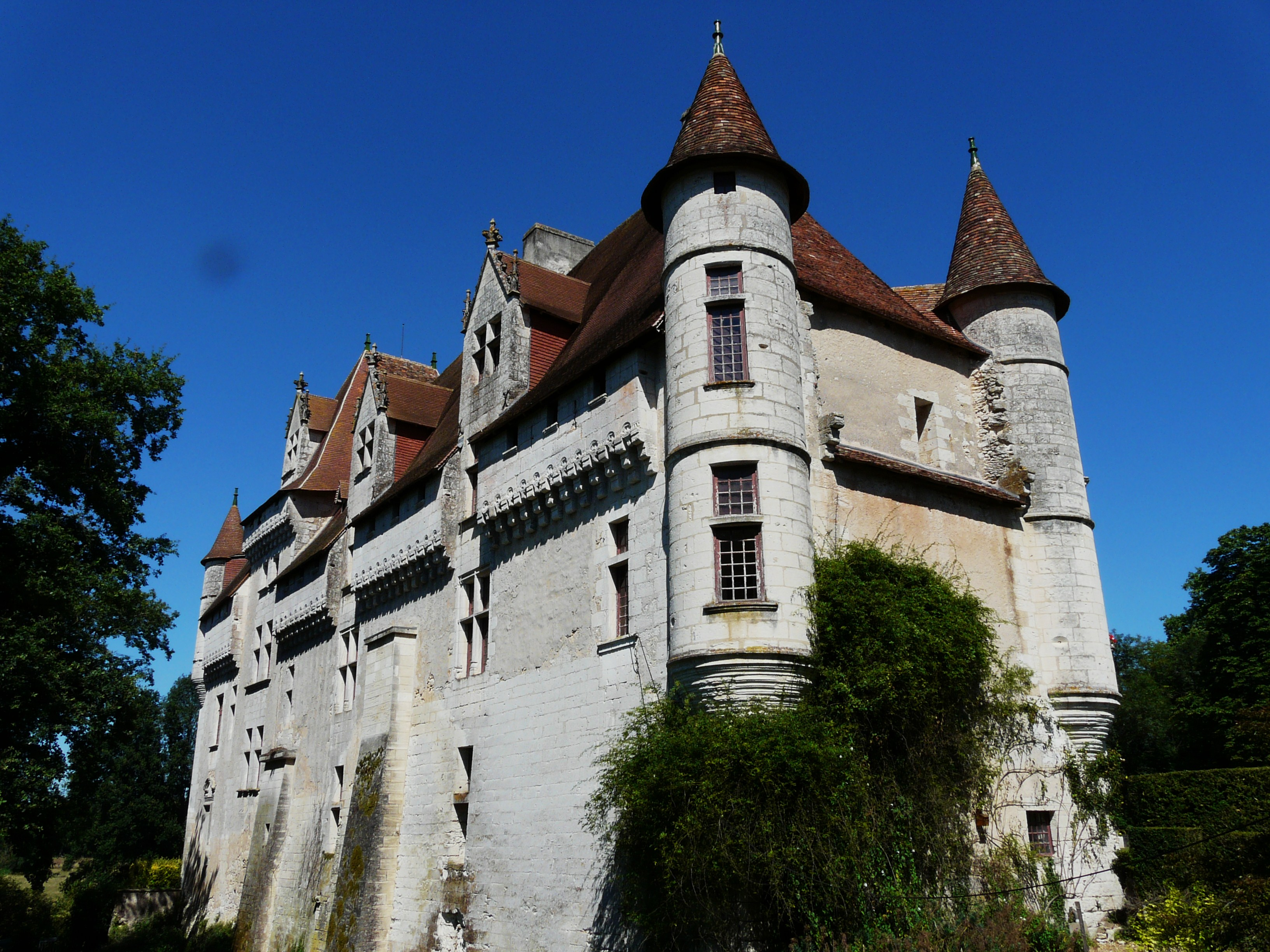 Château de Neuvic (également appelé château de Mellet) à Neuvic (Dordogne) Object location45° 06′ 12″ N, 0° 28′ 31″ E